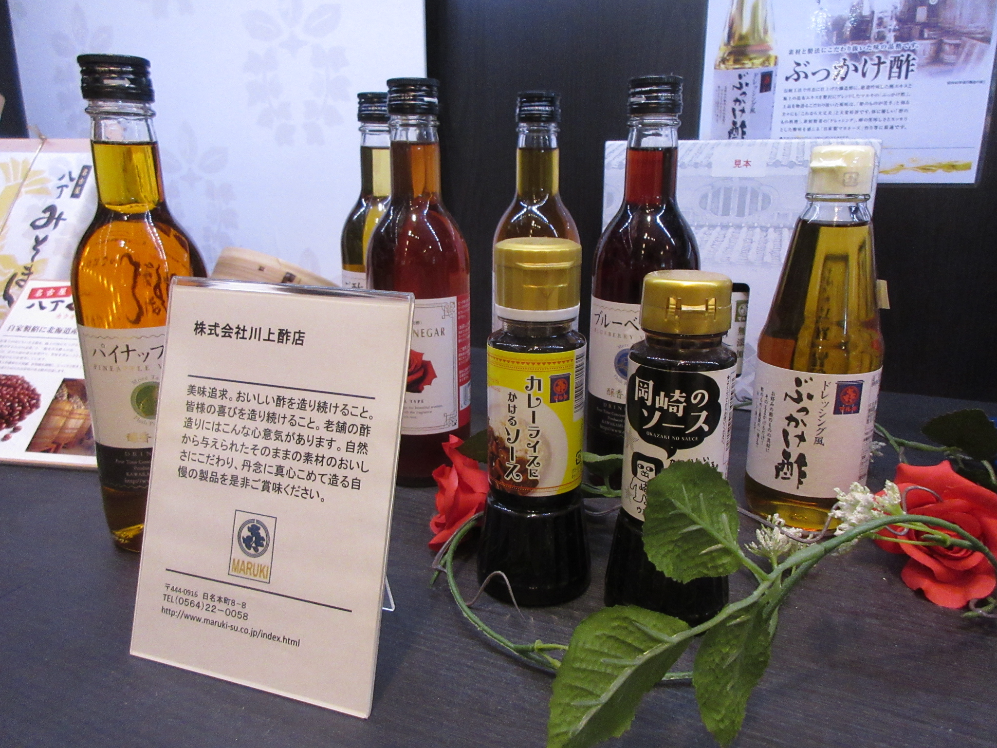 川上酢店（愛知県岡崎市）の主力商品